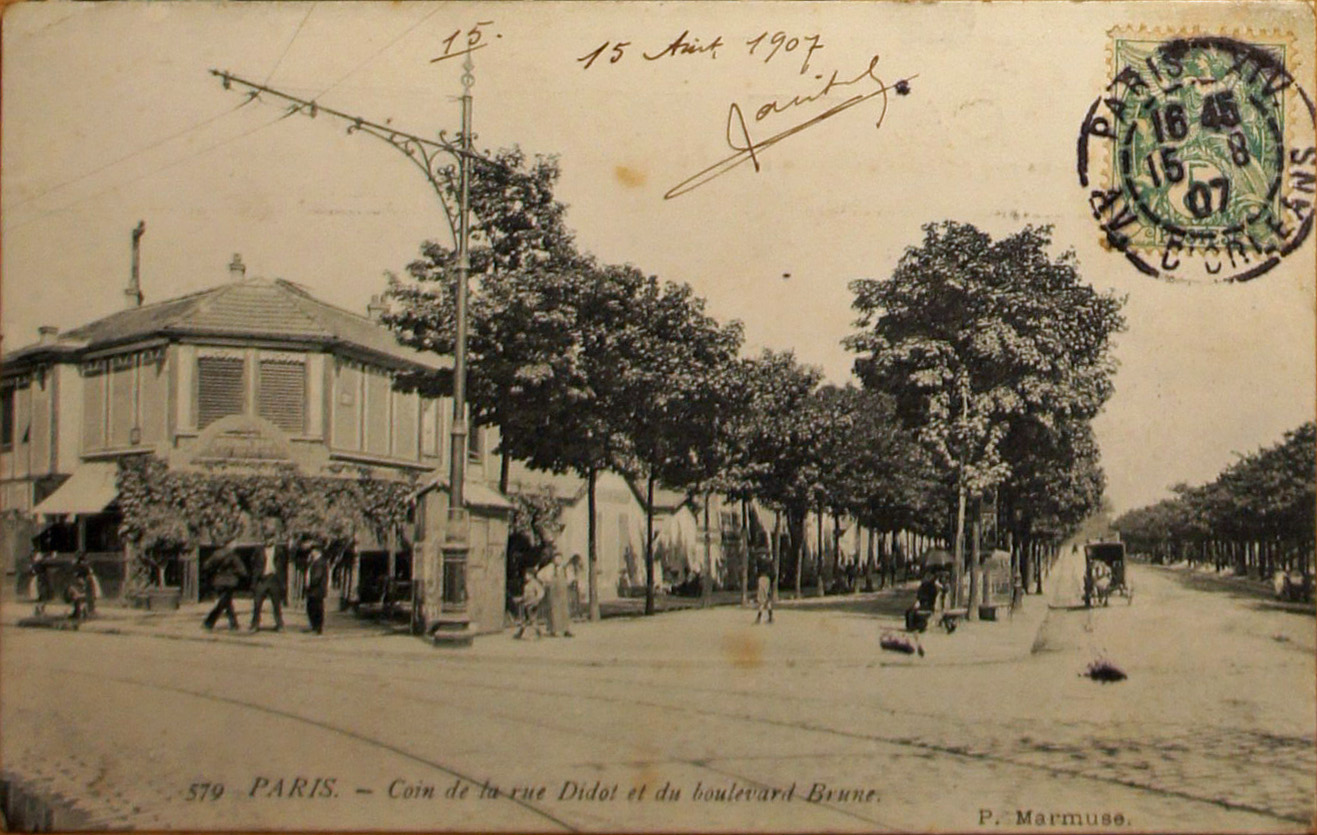 Paris Coin Didot Brune 15 VIII 1907. - Arbres d'alignement.